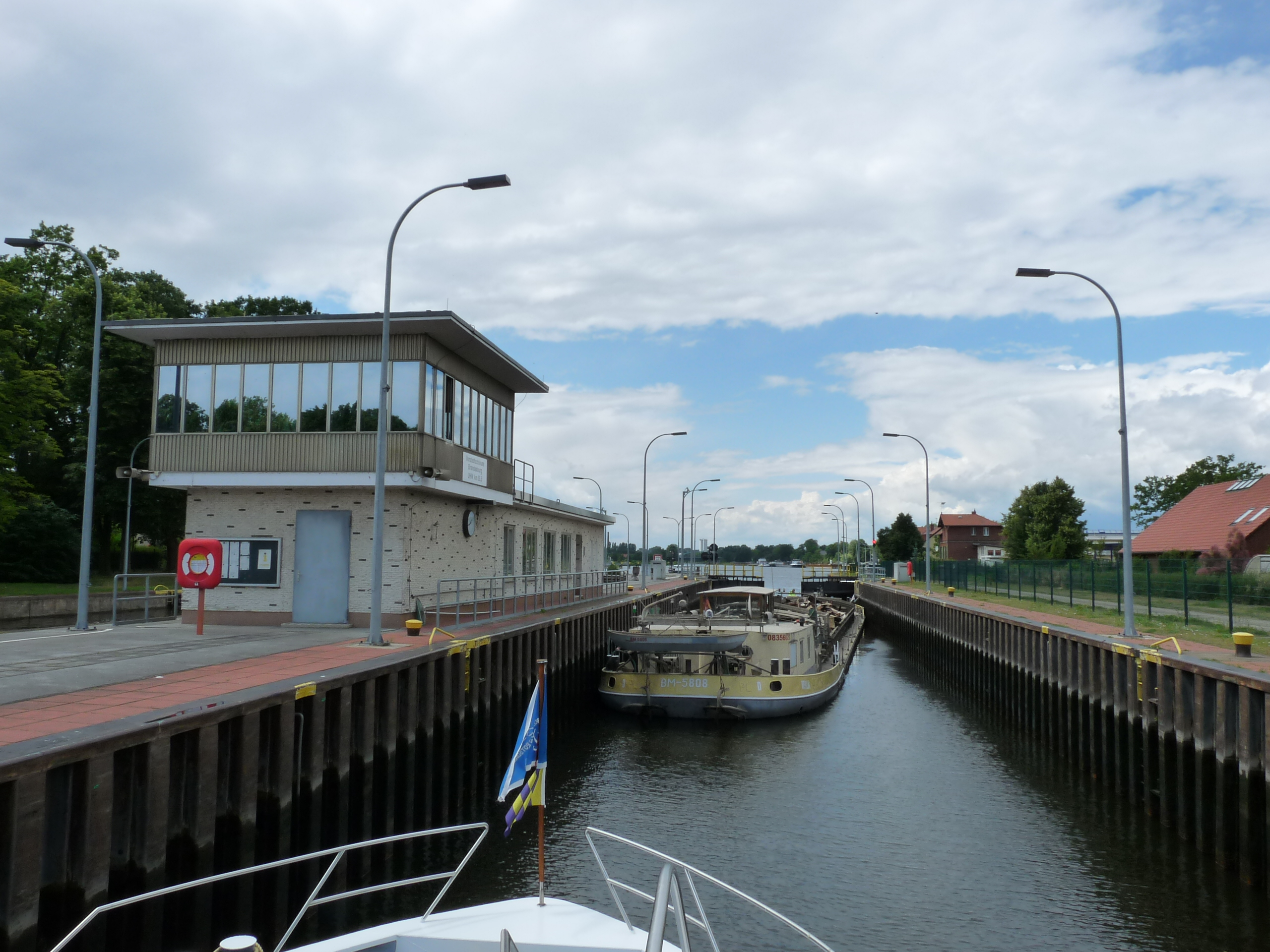 Vorstadtschleuse Brandenburg Nordkammer zu Tal.